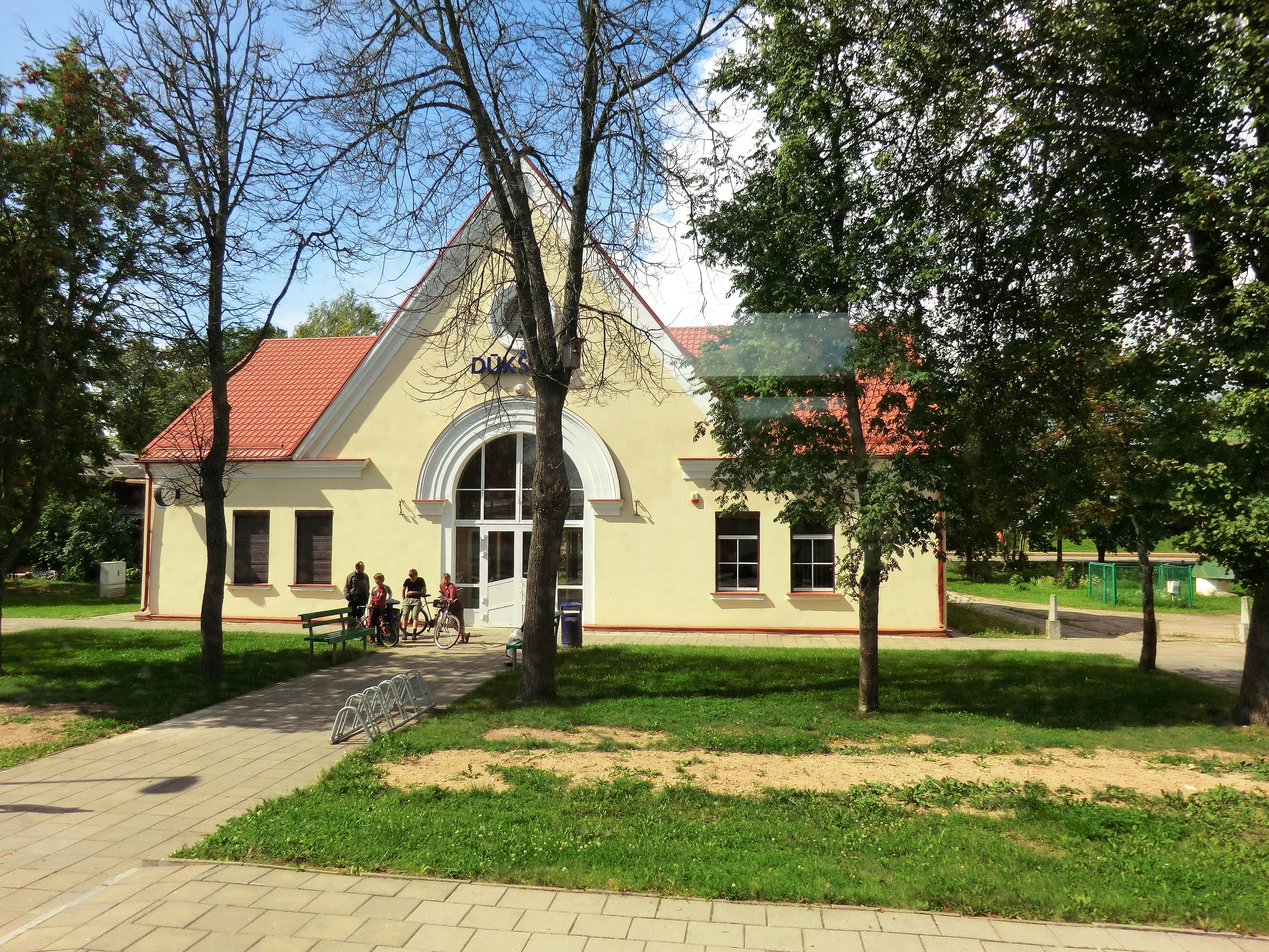 ст. Дукштас